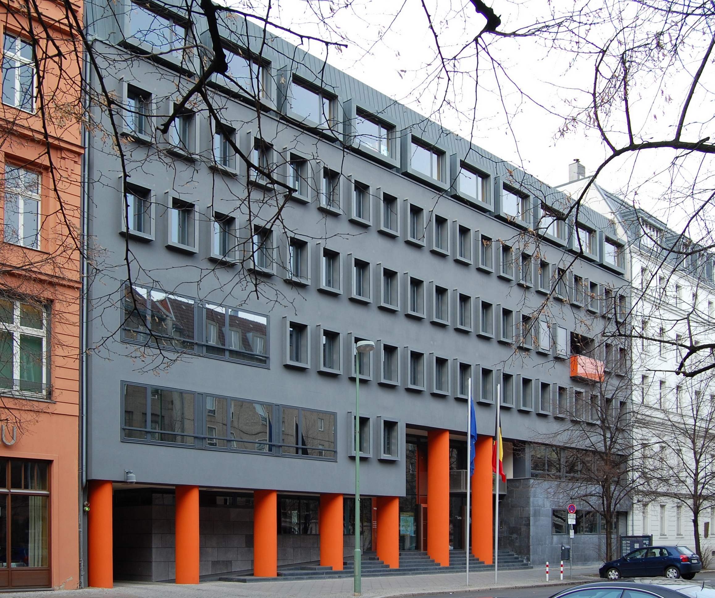 Belgian Embassy in Berlin